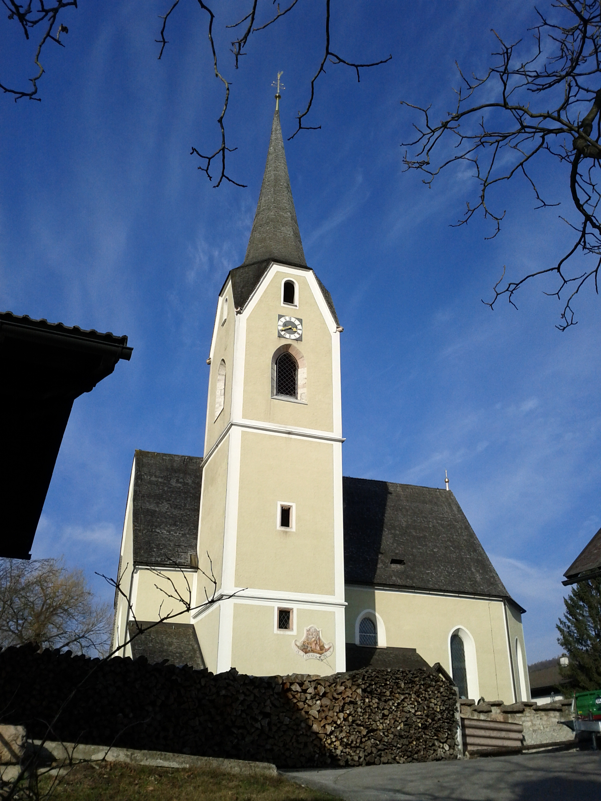 Katholische Pfarrkirche Mariä Geburt - Puch bei Hallein